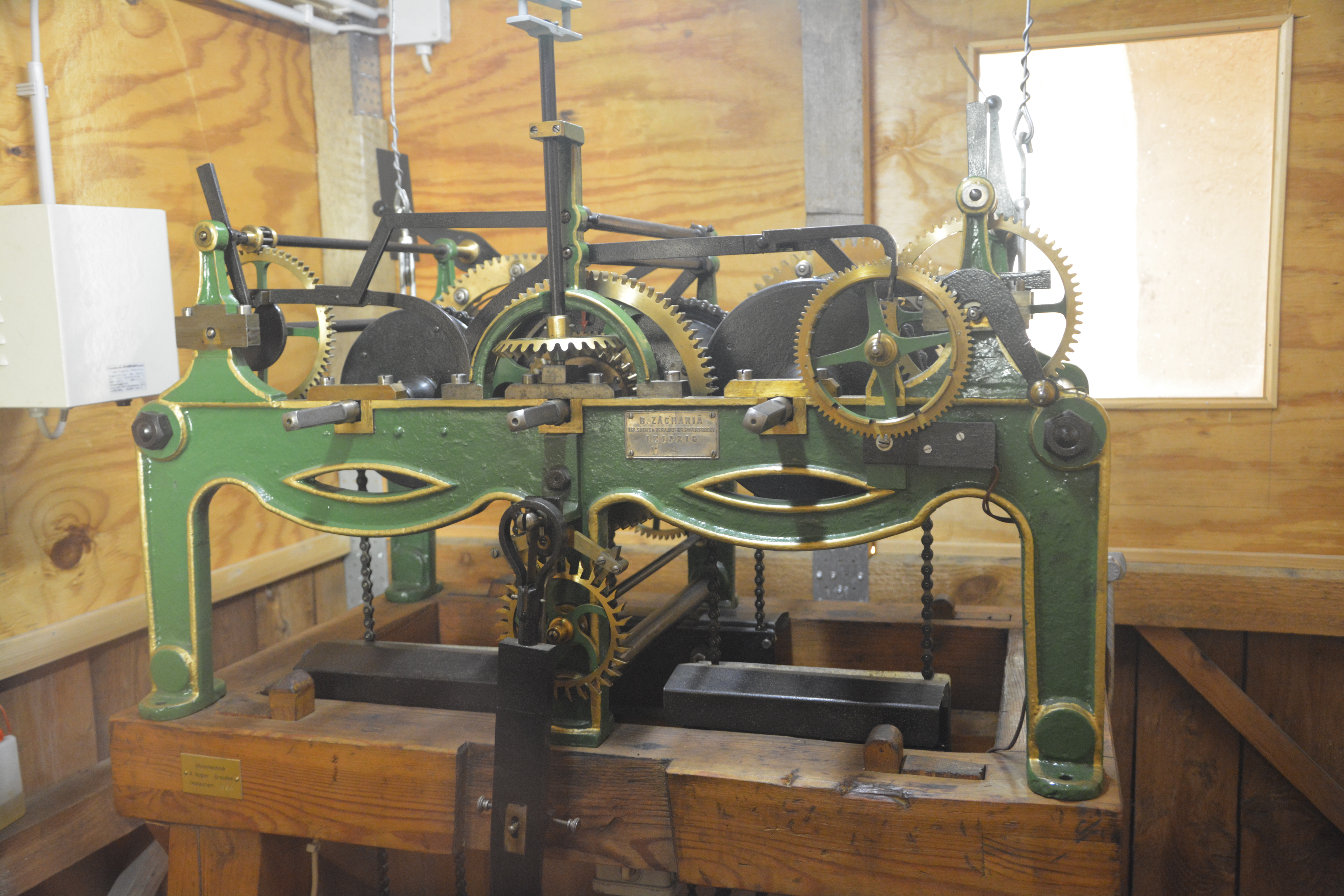 Stadtkirche "Zum Heiligen Namen Gottes" Radeberg, Turmaufstieg